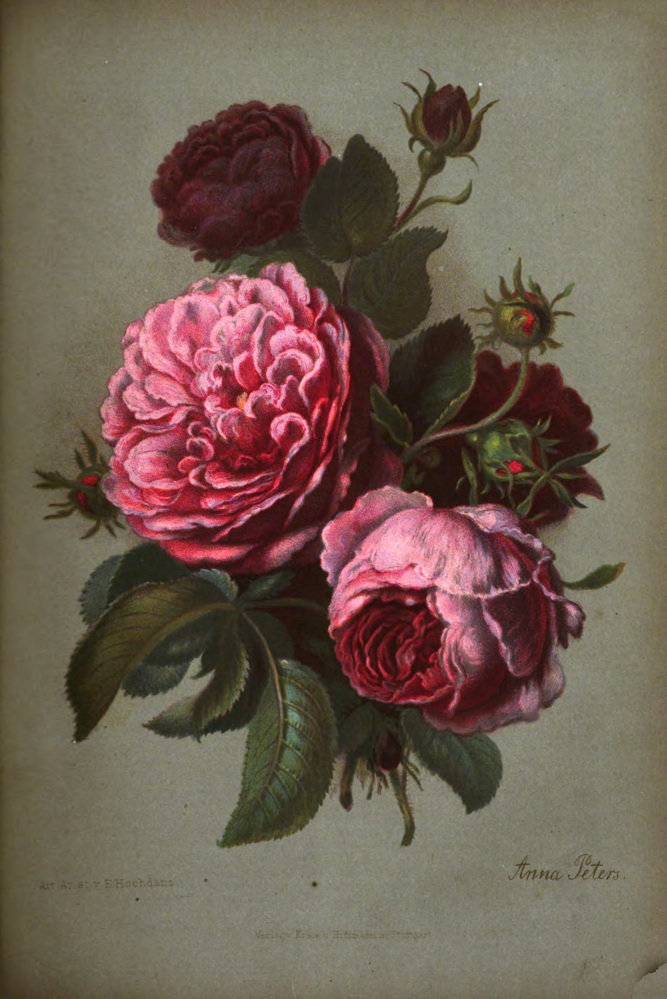 Rosen-Stilleben von der Malerin Anna Peters († 26.6.1926).